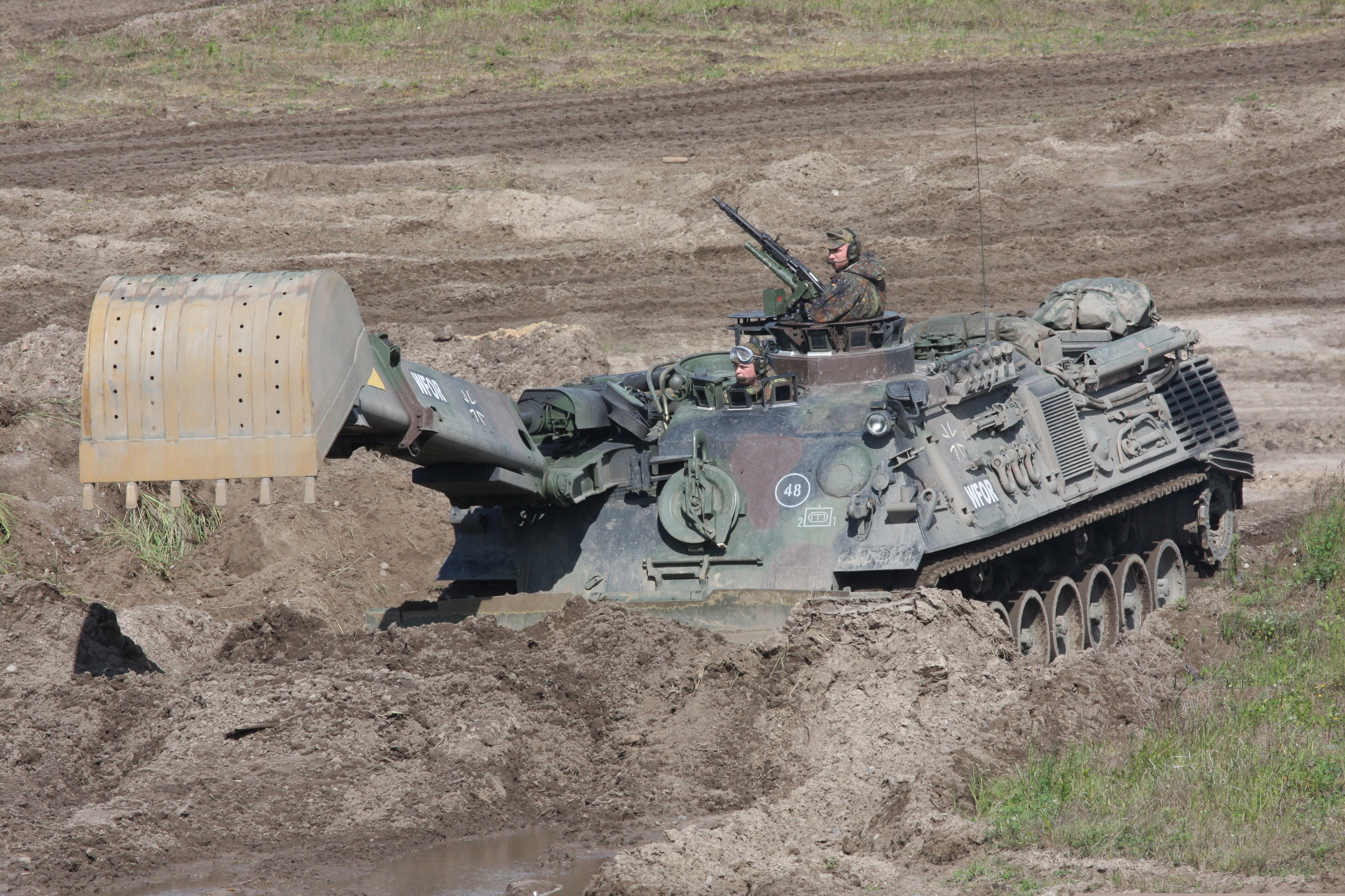 Pionierpanzer Dachs - Lehrvorführung auf einem Truppenübungsplatz.. ©Bundeswehr/Schneider